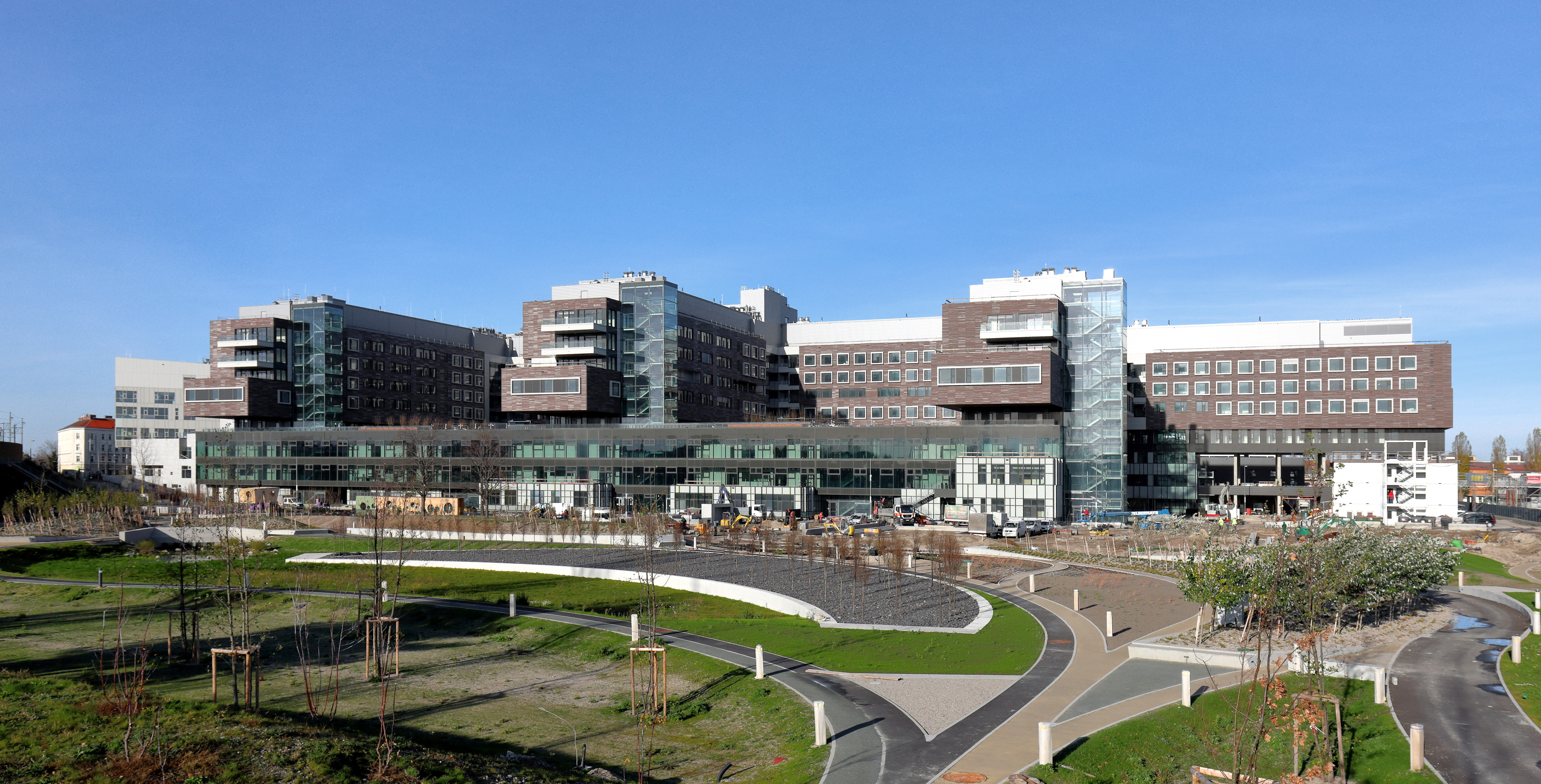 Südansicht des Krankenhauses Nord im 21. Wiener Gemeindebezirk Floridsdorf.Die Bauarbeiten am zirka 110.000 m² großen Areal für das an der Brünner Straße gelegene 800-Betten-Spital begannen 2010 (Grundsteinlegung 2012). Ursprünglich war ein Vollbetrieb ab 2016 und Gesamtkosten von 825 Mio. Euro geplant. Aktuell ist ein Teilbetrieb ab Ende 2018 geplant und man rechnet mit Kosten von 1,5 Mrd. aufwärts.